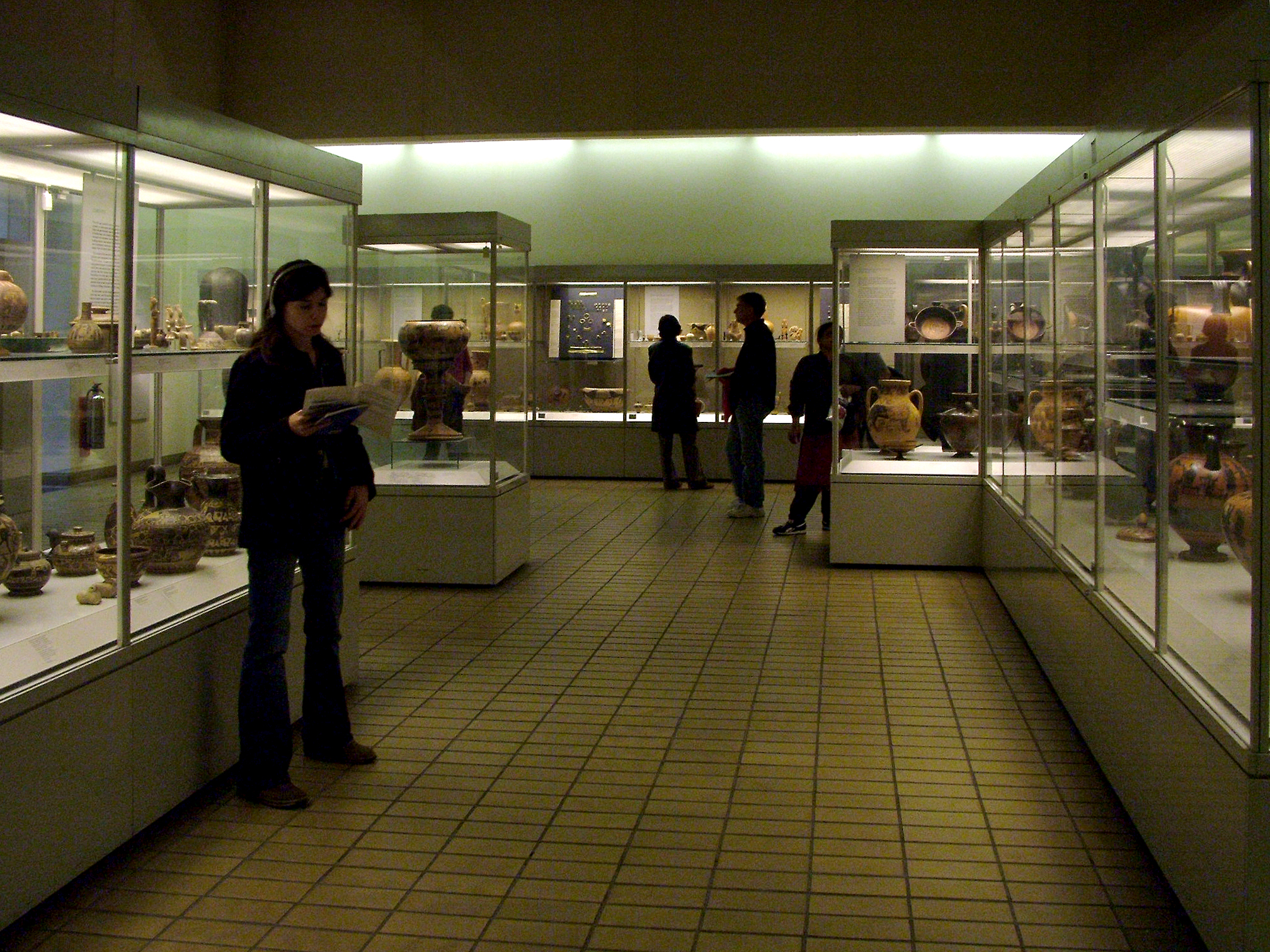 British Museum: Kerámiagaléria